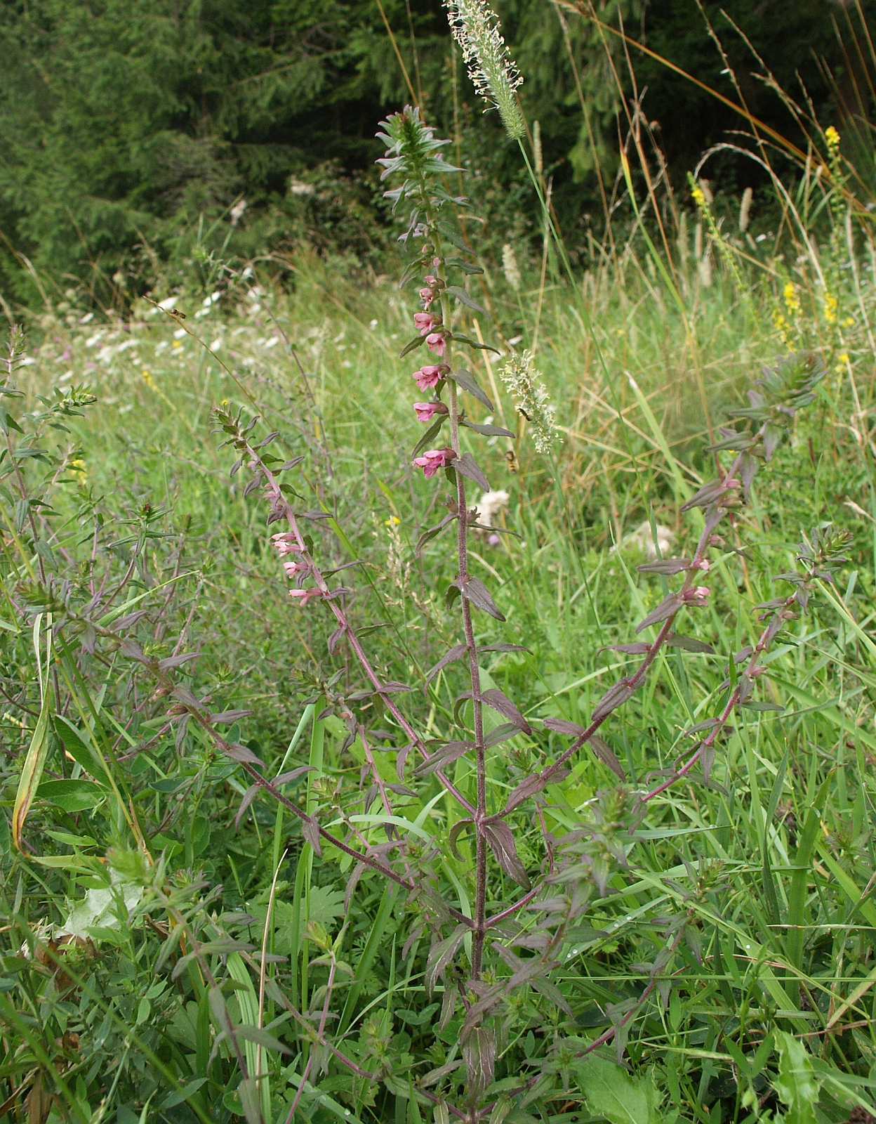 Odontites vulgaris, Frankenhöhe, Germany